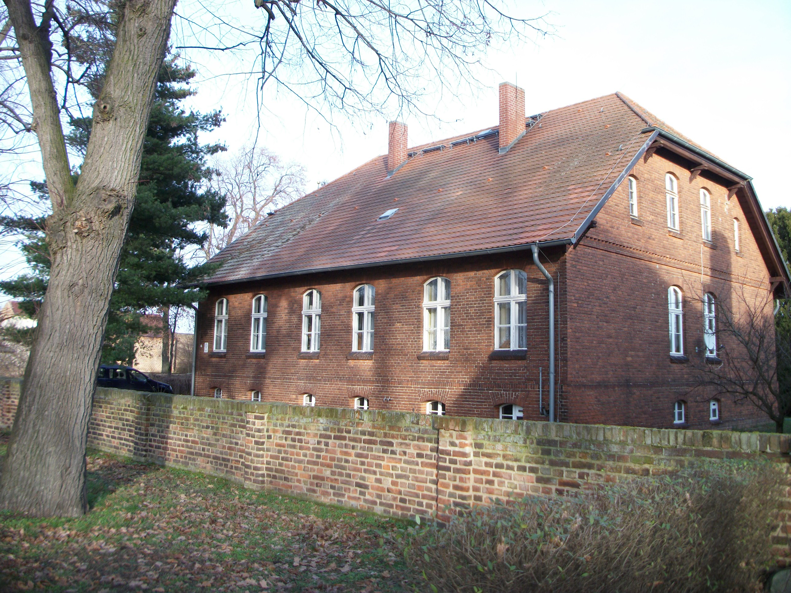 Pfarrhaus in Netzen Baudenkmal